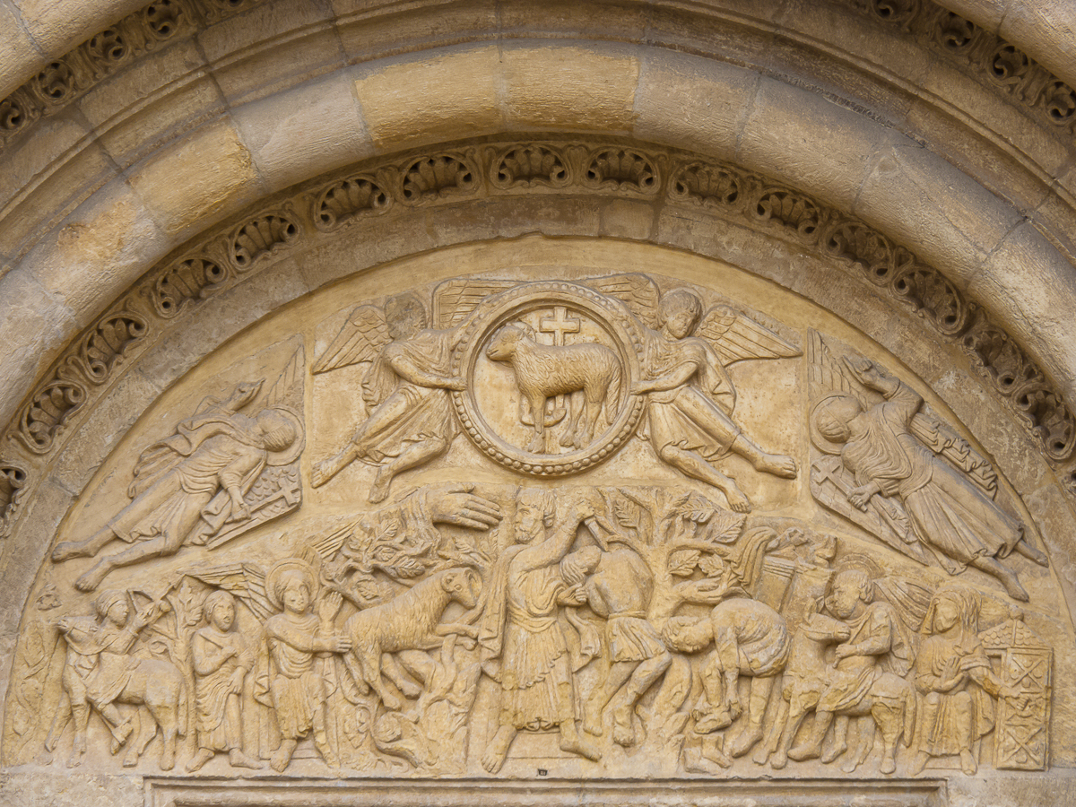 07082013 162653 LEÓN 0018